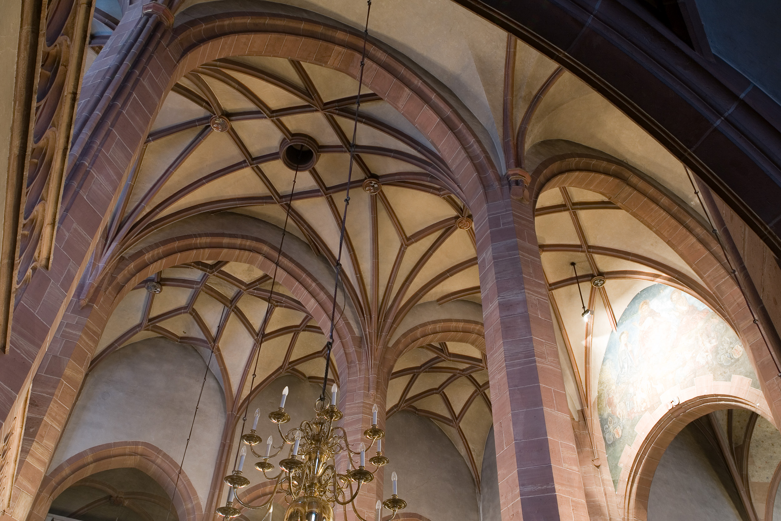 Gewölbe im Hauptschiff der Leonhardskirche in Frankfurt am Main. Selber fotografiert im März 2008, Doppellizensierung GFDL & CC-BY-SA 2.5.